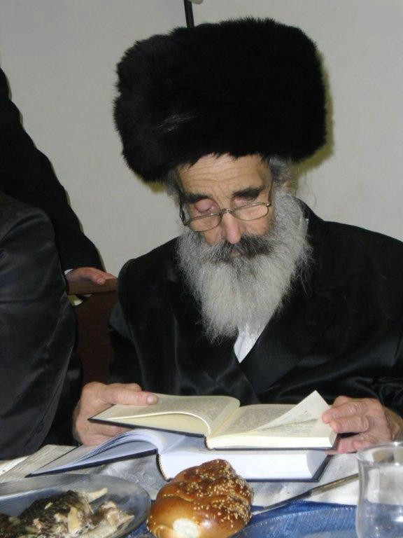 komemiyut